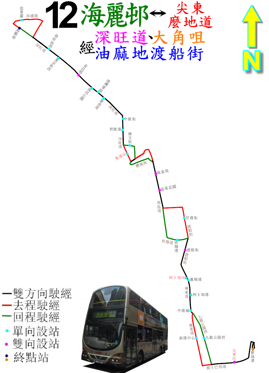 中文（香港）: 九巴12線的走線圖